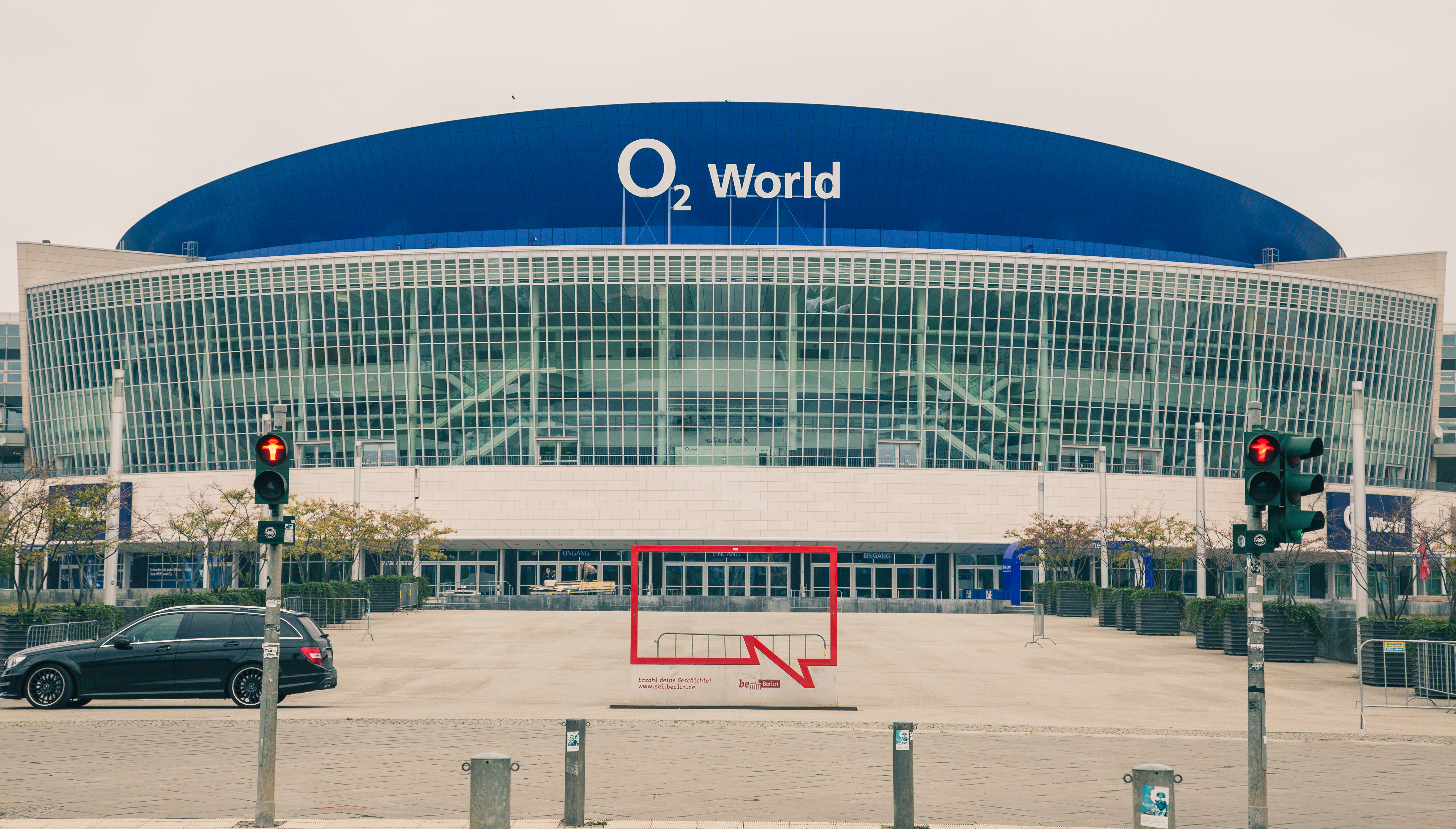 Friedrichshain, Berlin, Germany